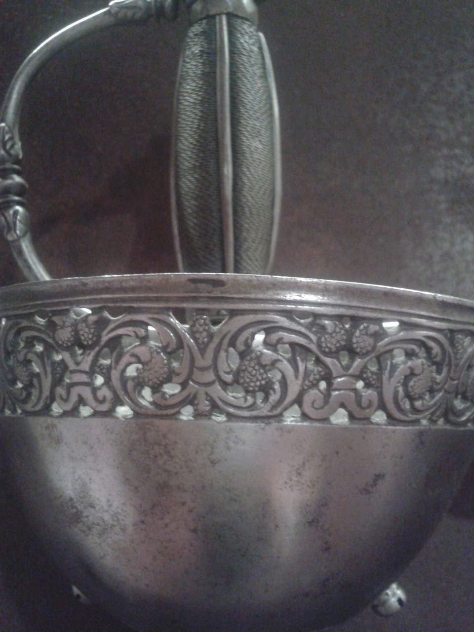 particolare elsa - spada a tazza . MAP museo Gromo